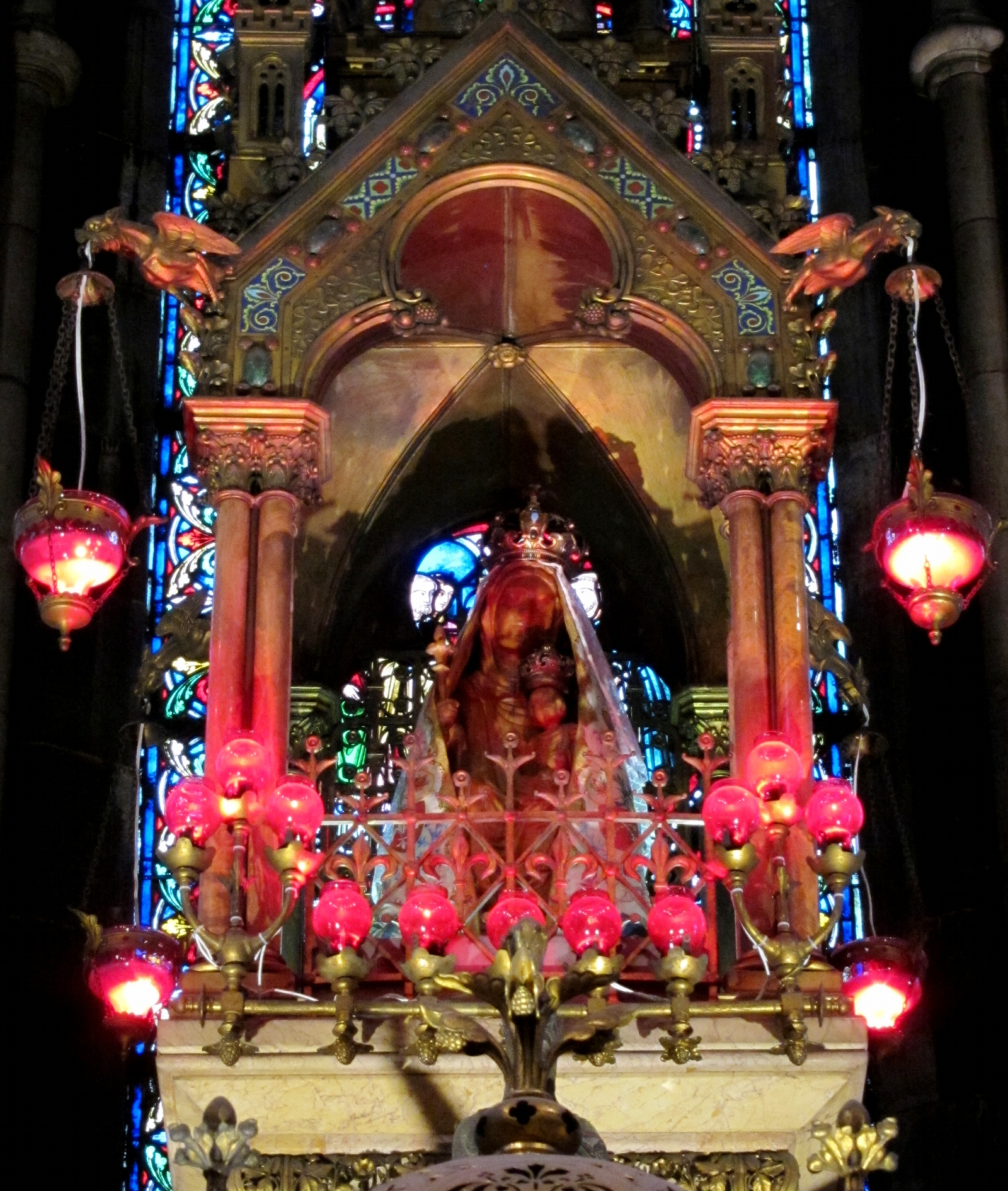 Statue de Notre-Dame de la Treille dans la sainte chapelle de la cathédrale de Lille (Nord).